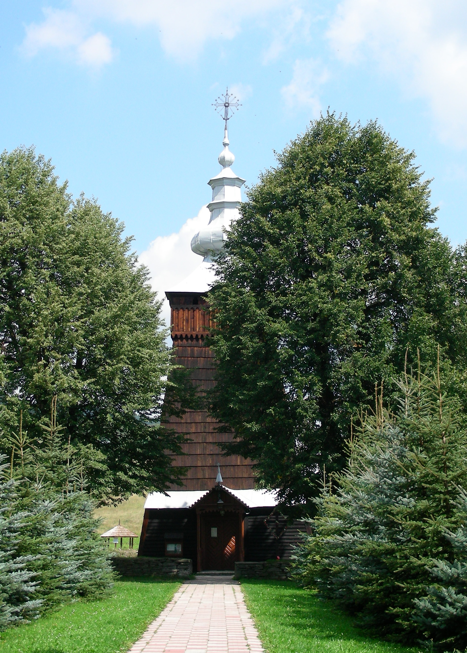 Szczawnik - dawna cerkiew greko-kat. p.w. św. Dymitra (obecnie kościół)